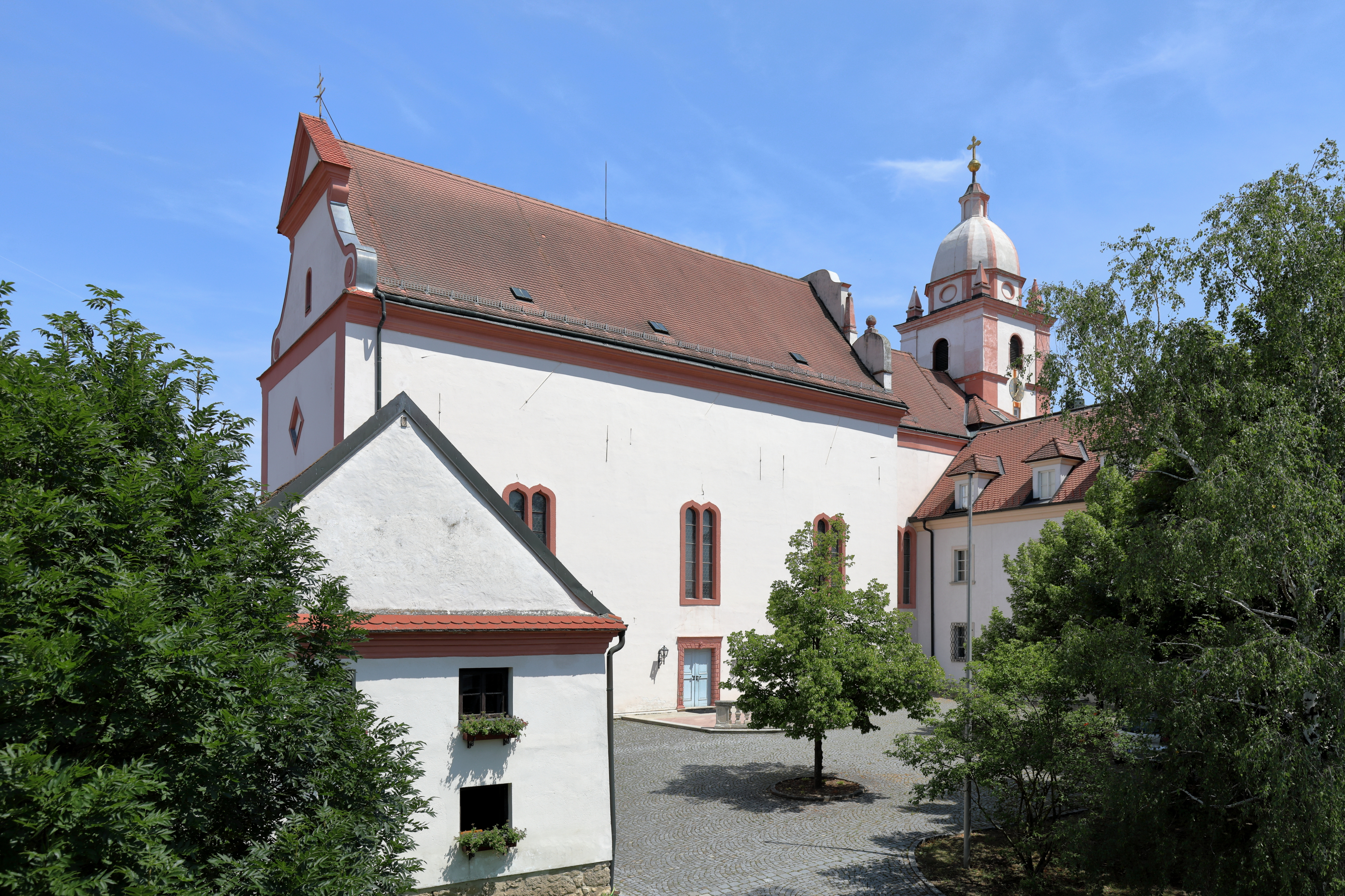 Südwestansicht der Wallfahrts- und Pfarrkirche Mariä Geburt in Maria Roggendorf, ein Ortsteil der niederösterreichischen Marktgemeinde Wullersdorf.